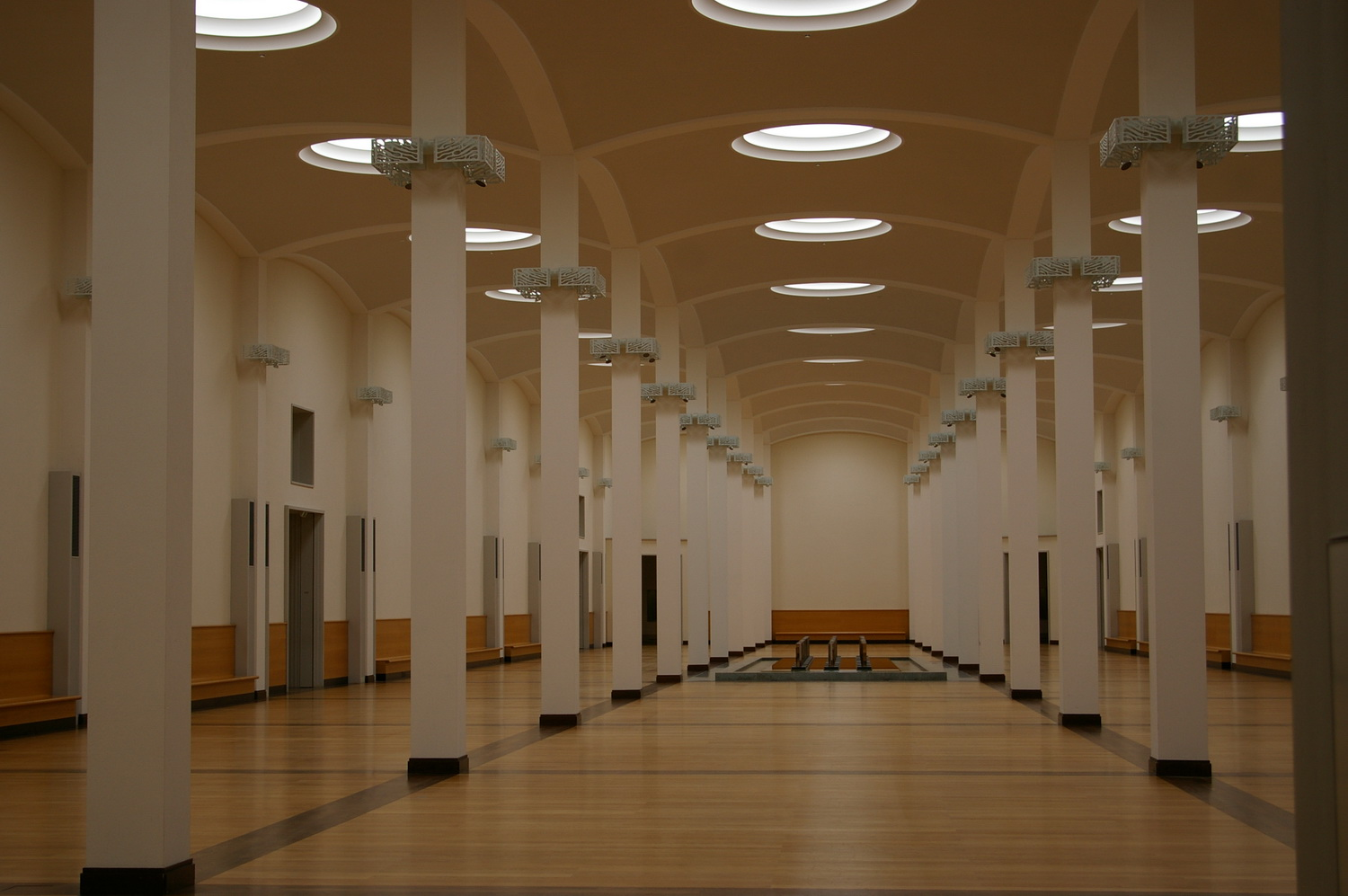 Gemaeldegalerie : grand hall